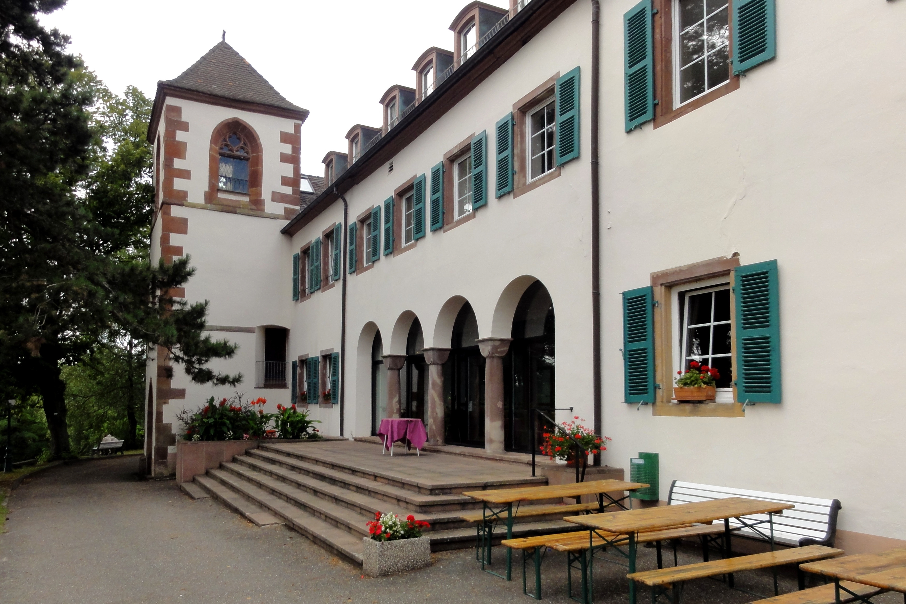 Alsace, Bas-Rhin, Goersdorf, Couvent du Liebfrauenberg (1384-1717): .